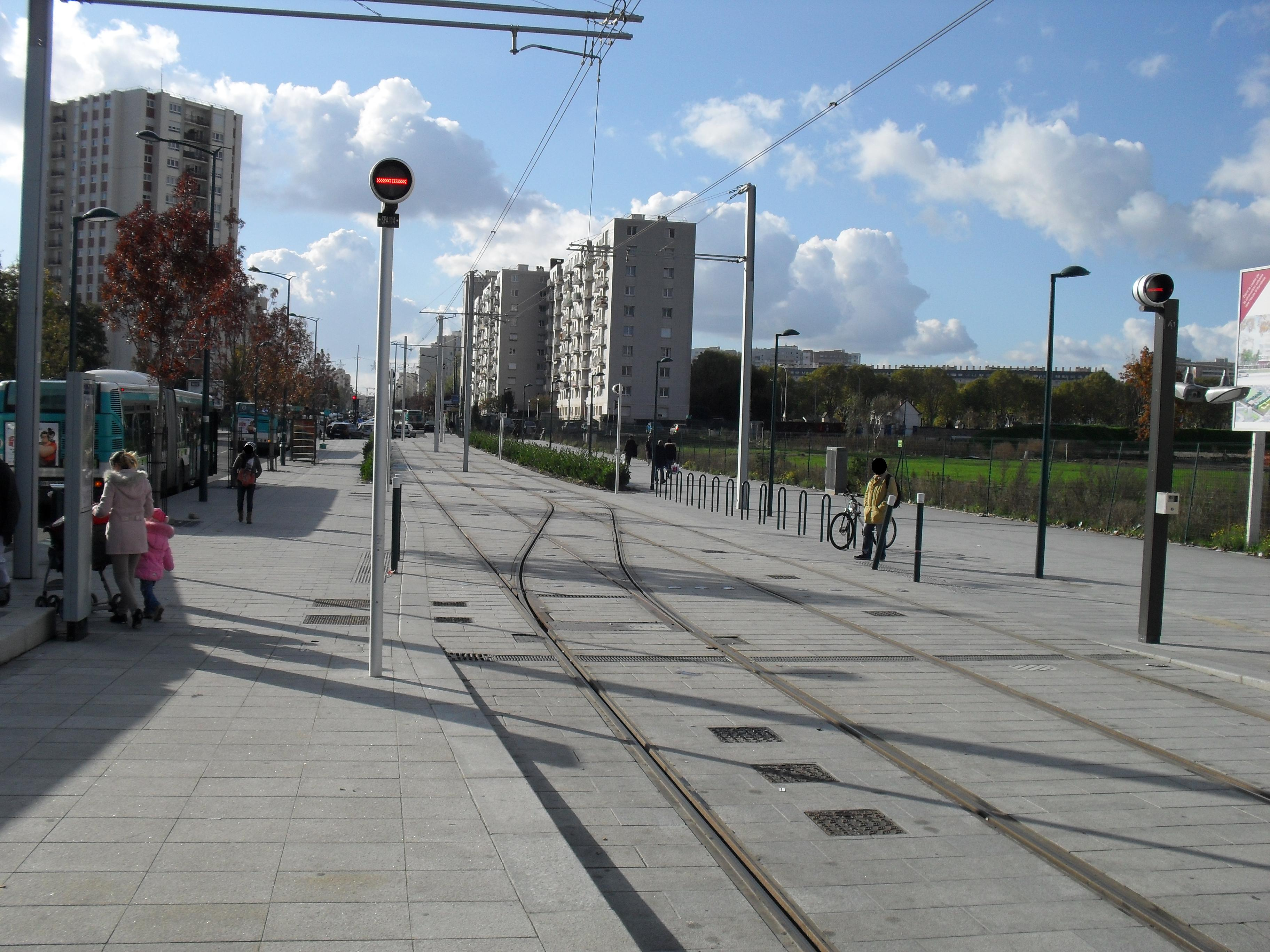 Paris Tramway ligne 1